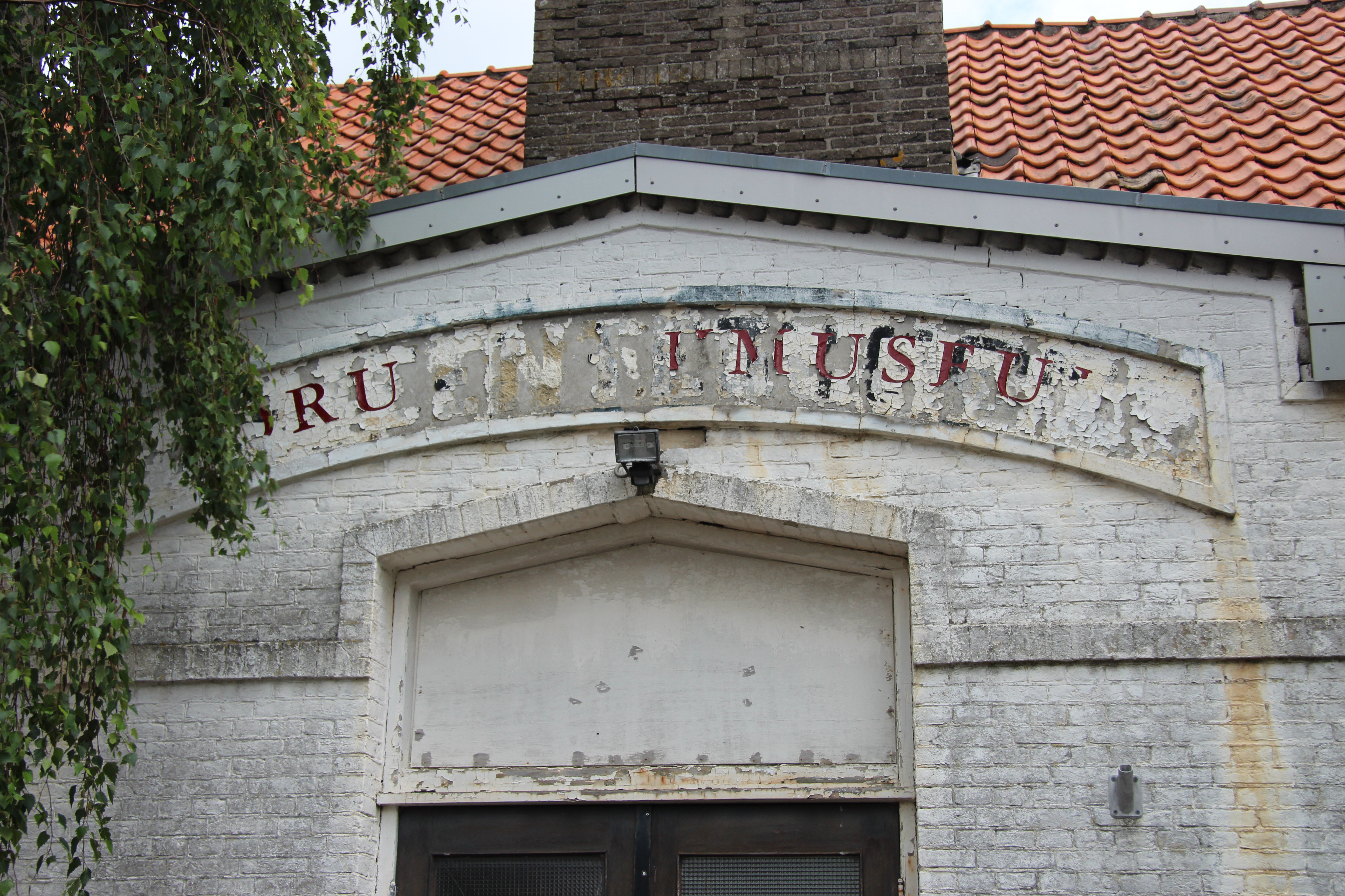 Hoge Morsweg 117 te Leiden detail opschrift